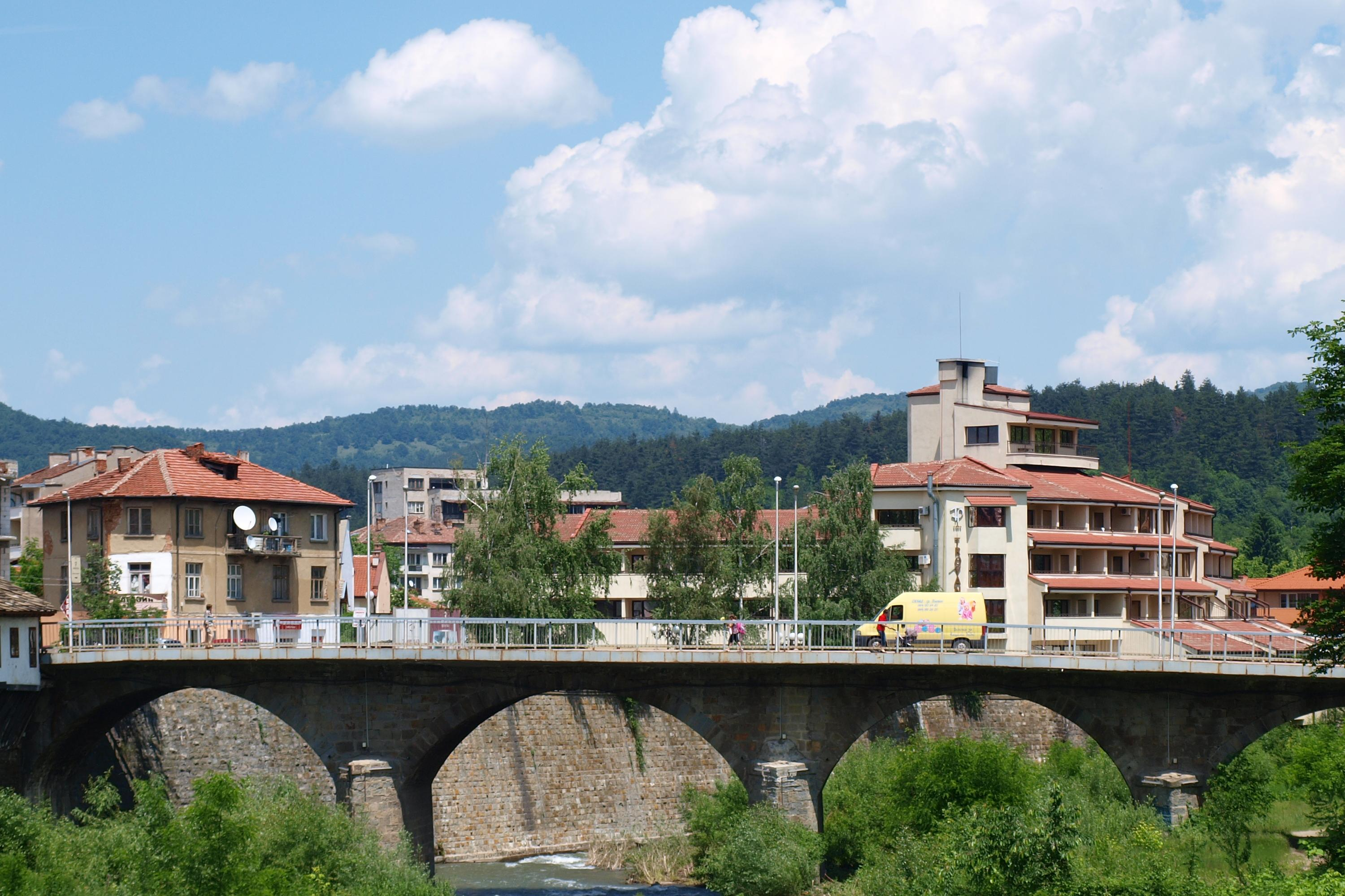 Мост над р. Осъм в гр. Троян